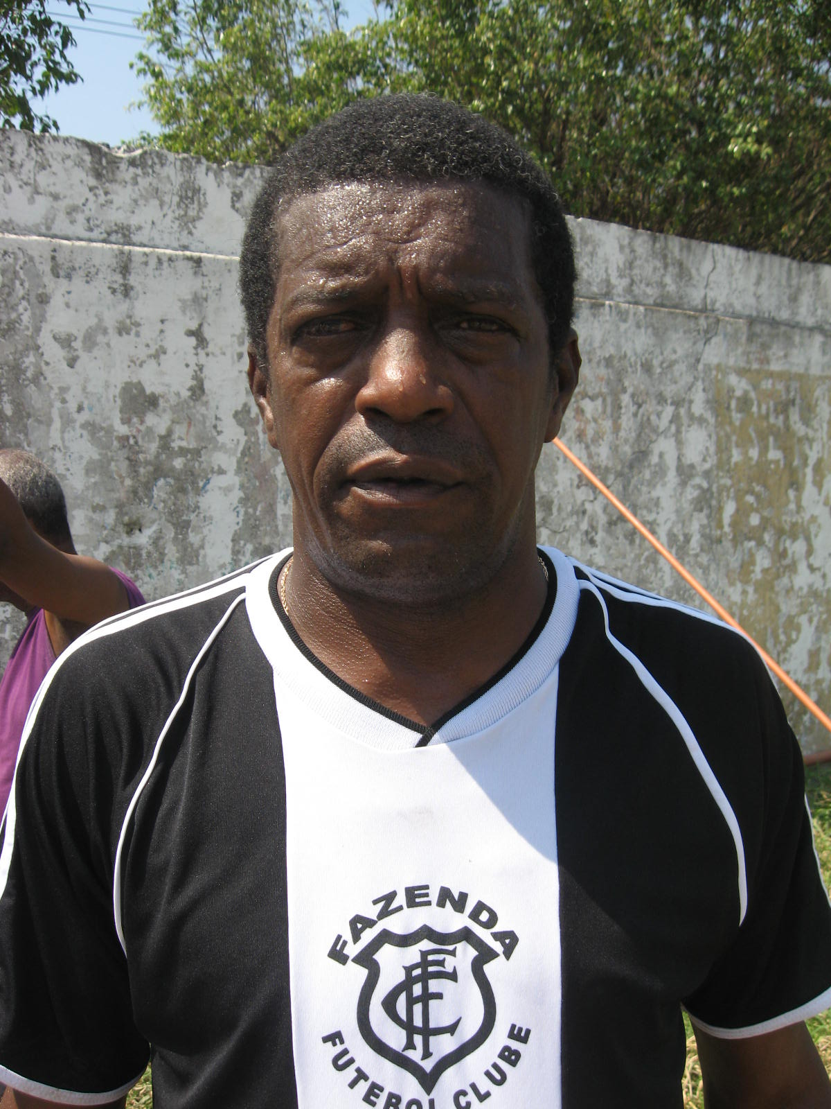 O campeão mundial de 70, Marco Antonio, fotografado em 2010.